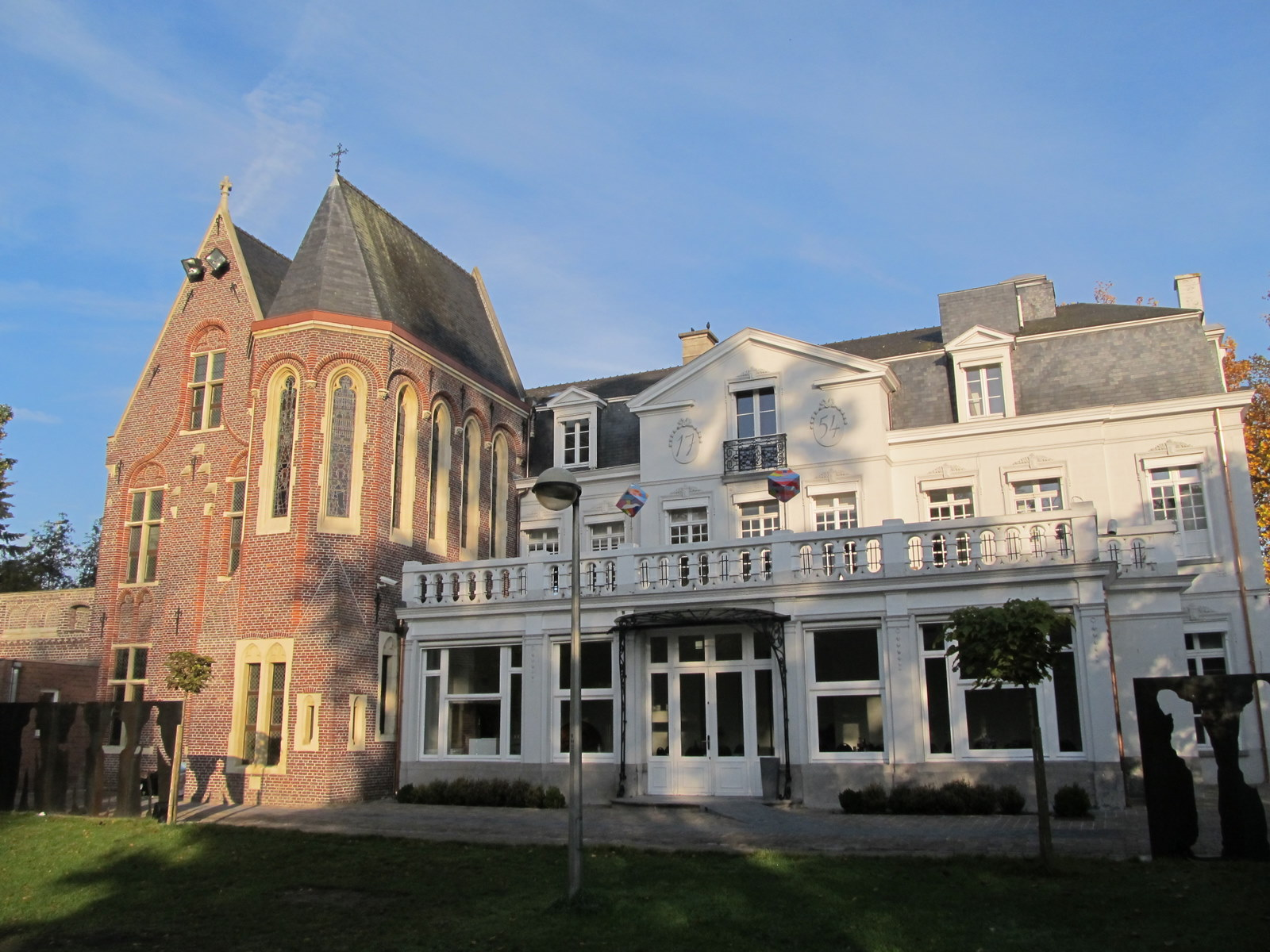 2011-10-23 in Ghent